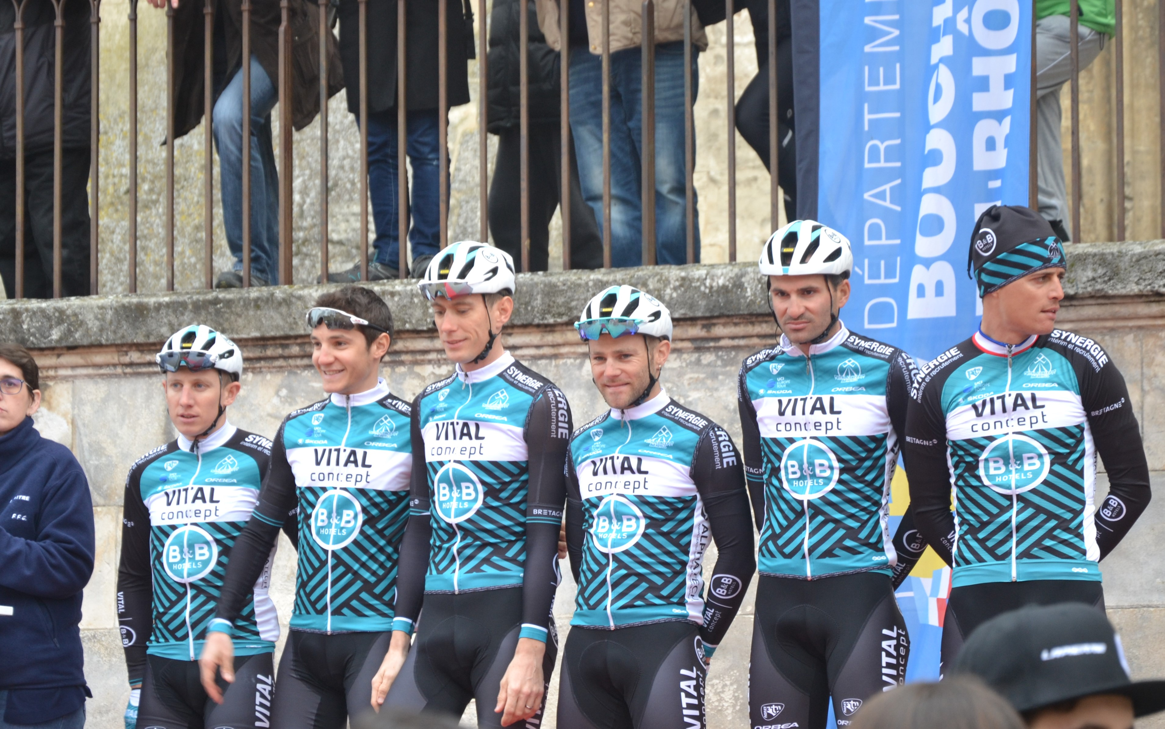 Lors du podium des signatures avant départ de l'étape